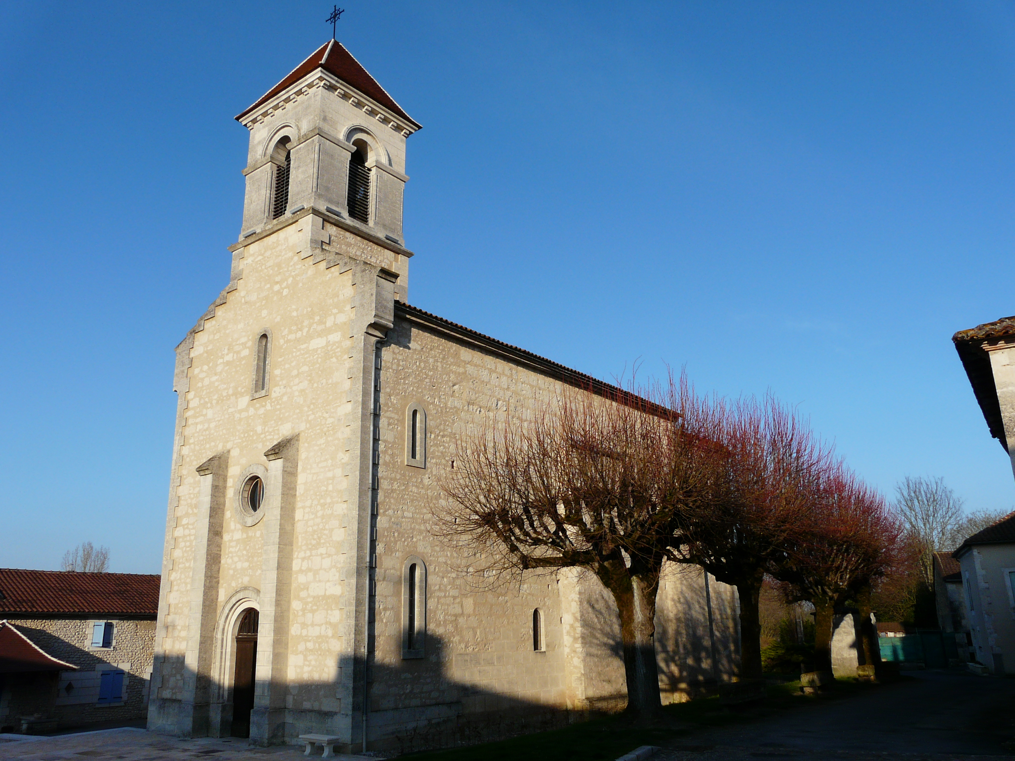 L'église Saint-Méard vue du sud-ouest, Saint-Méard-de-Drône, Dordogne, France.